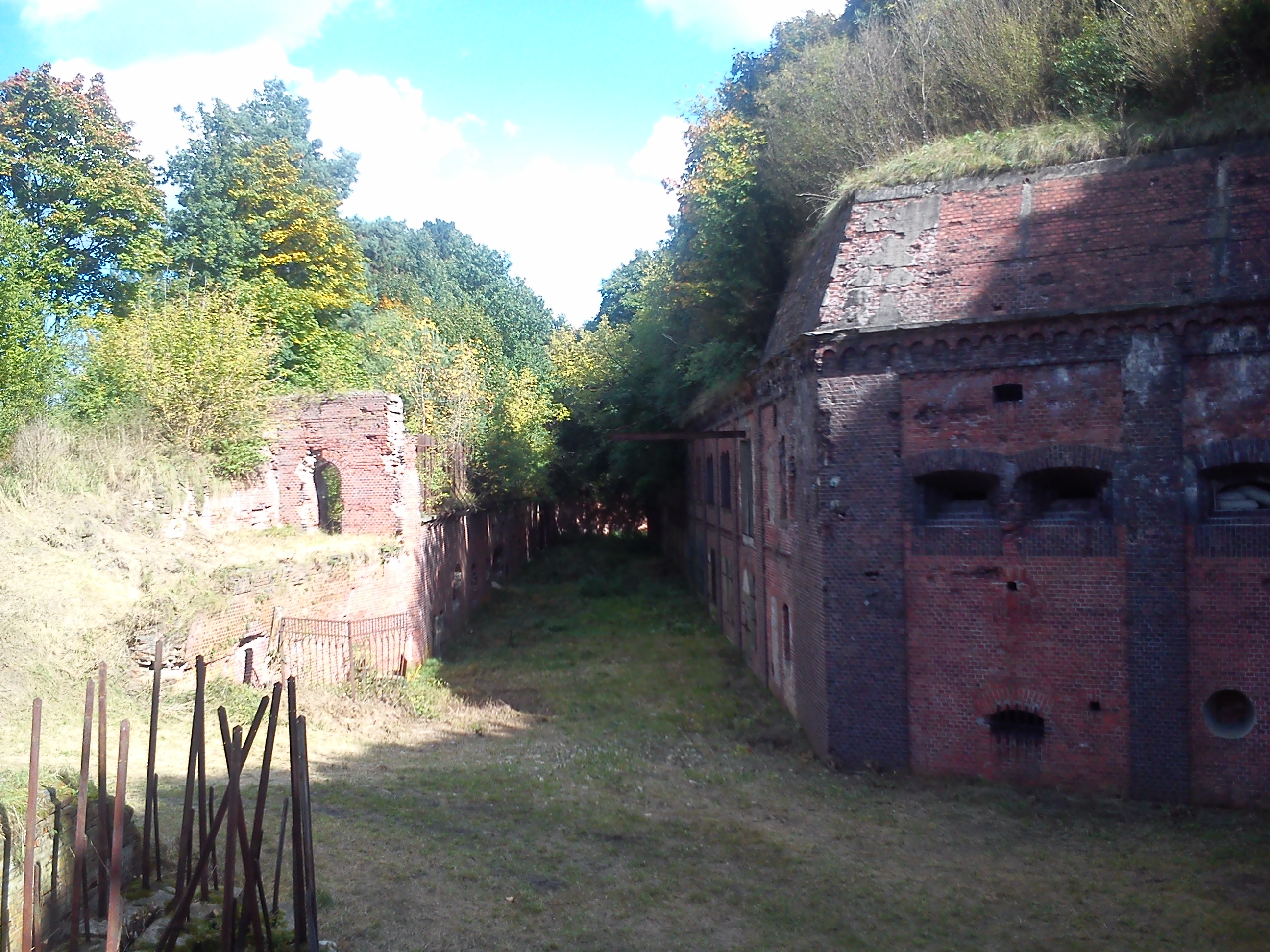 Toruń, fort XIII im. K. Kniaziewicza, 1880-1885, 1889-1893, 1905-1914